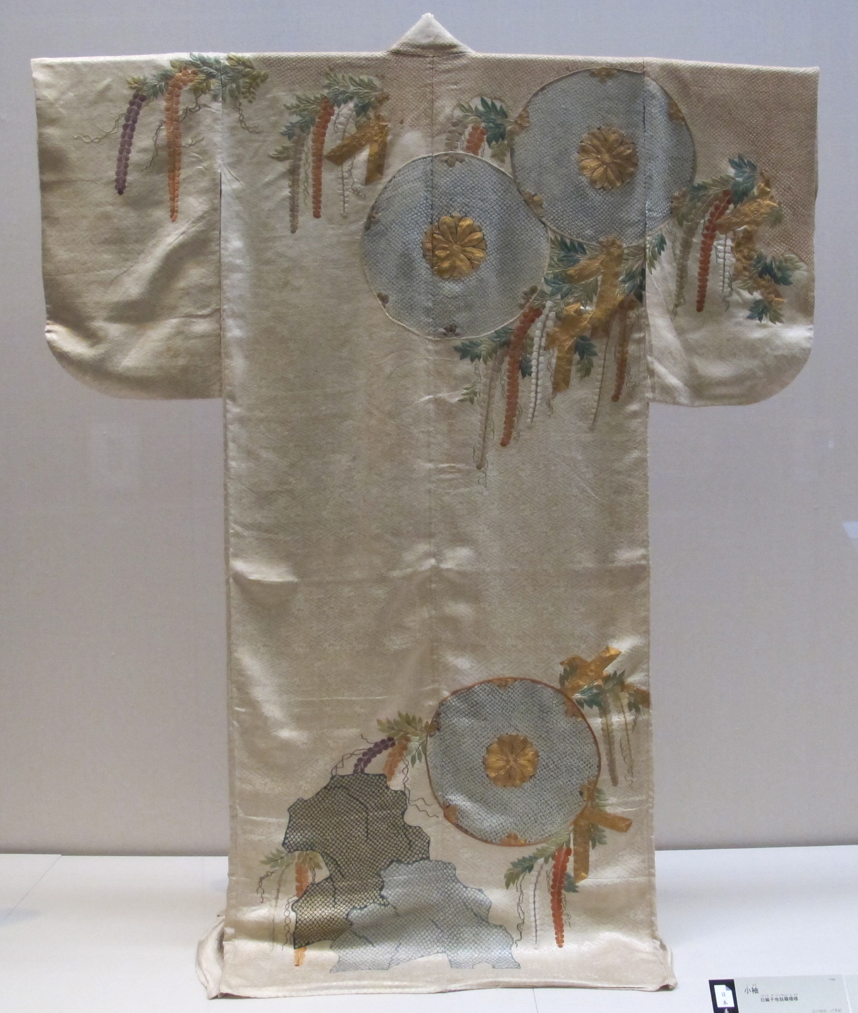 Periodo edo, kosode, XVIII sec. 2